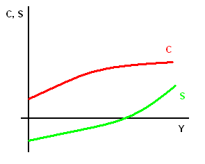 Curve del consumo e del risparmio secondo la teoria keynesiana